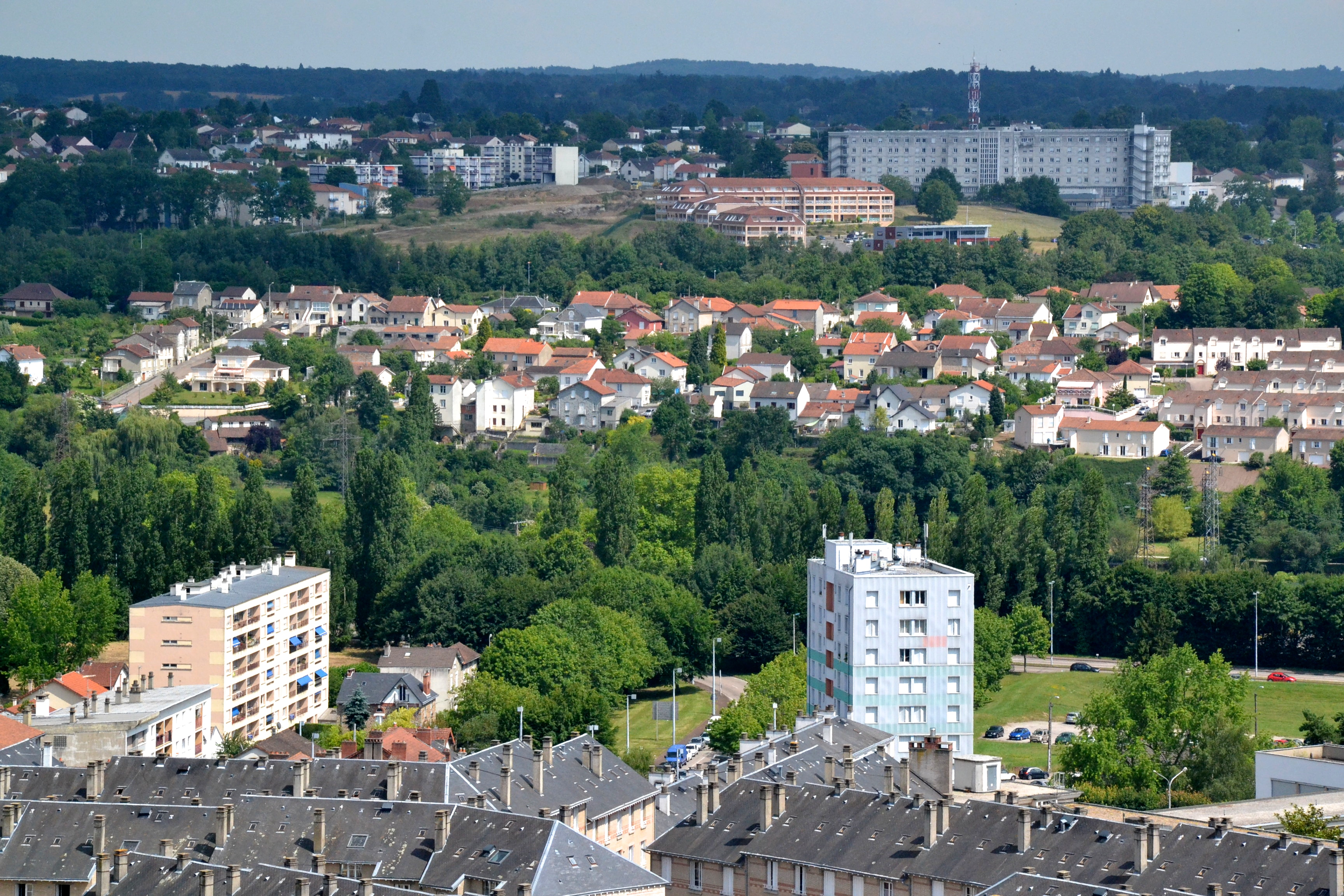 Quartier de Soudanas puis Panazol depuis le campanile de la gare de Limoges. Au premier plan, la cité des Coutures puis la Vienne.